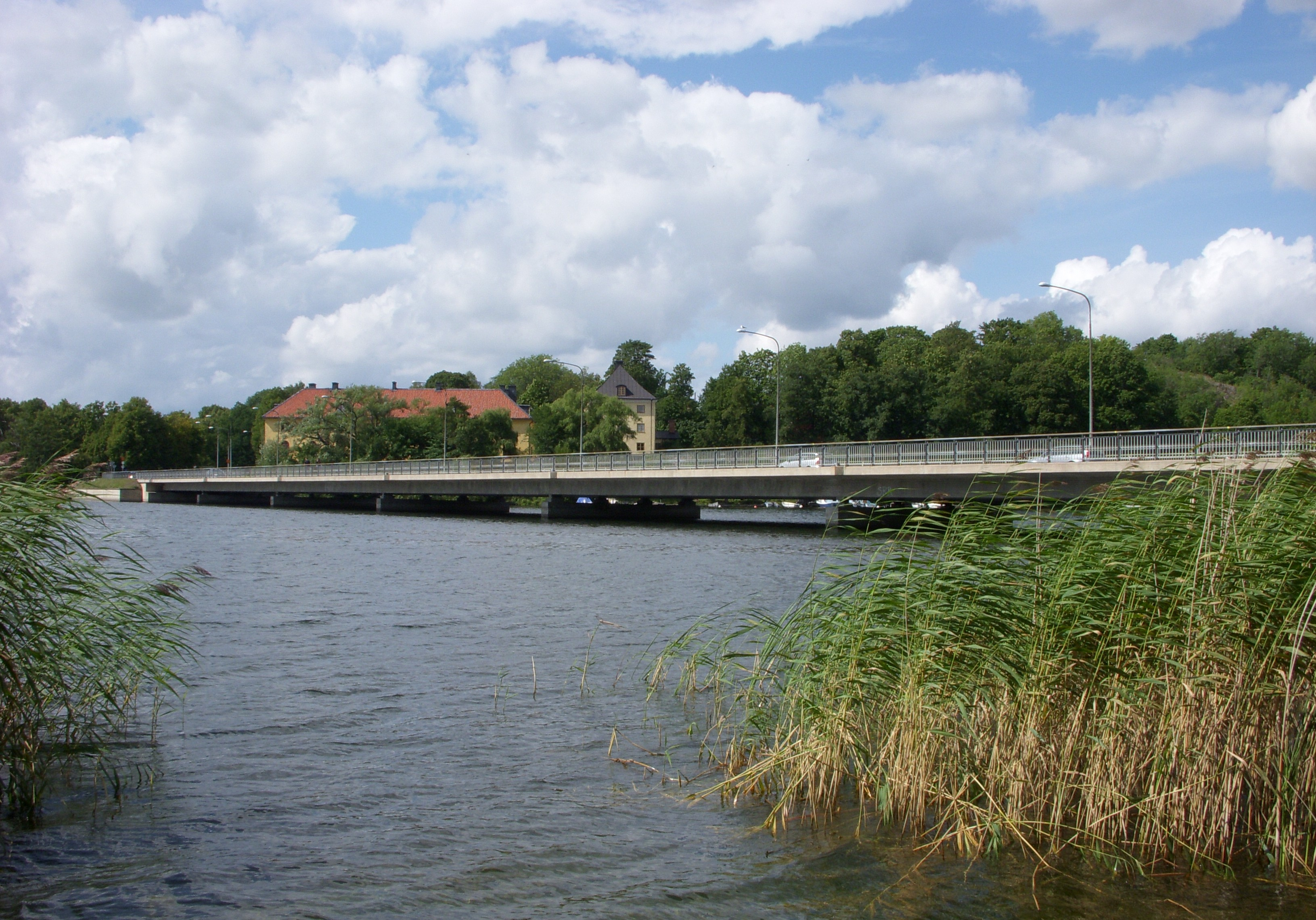 Drottningholmsbron på Ekerö